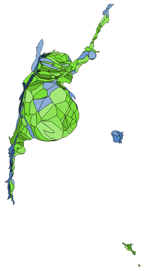 中文（台灣）: 顏色對照表